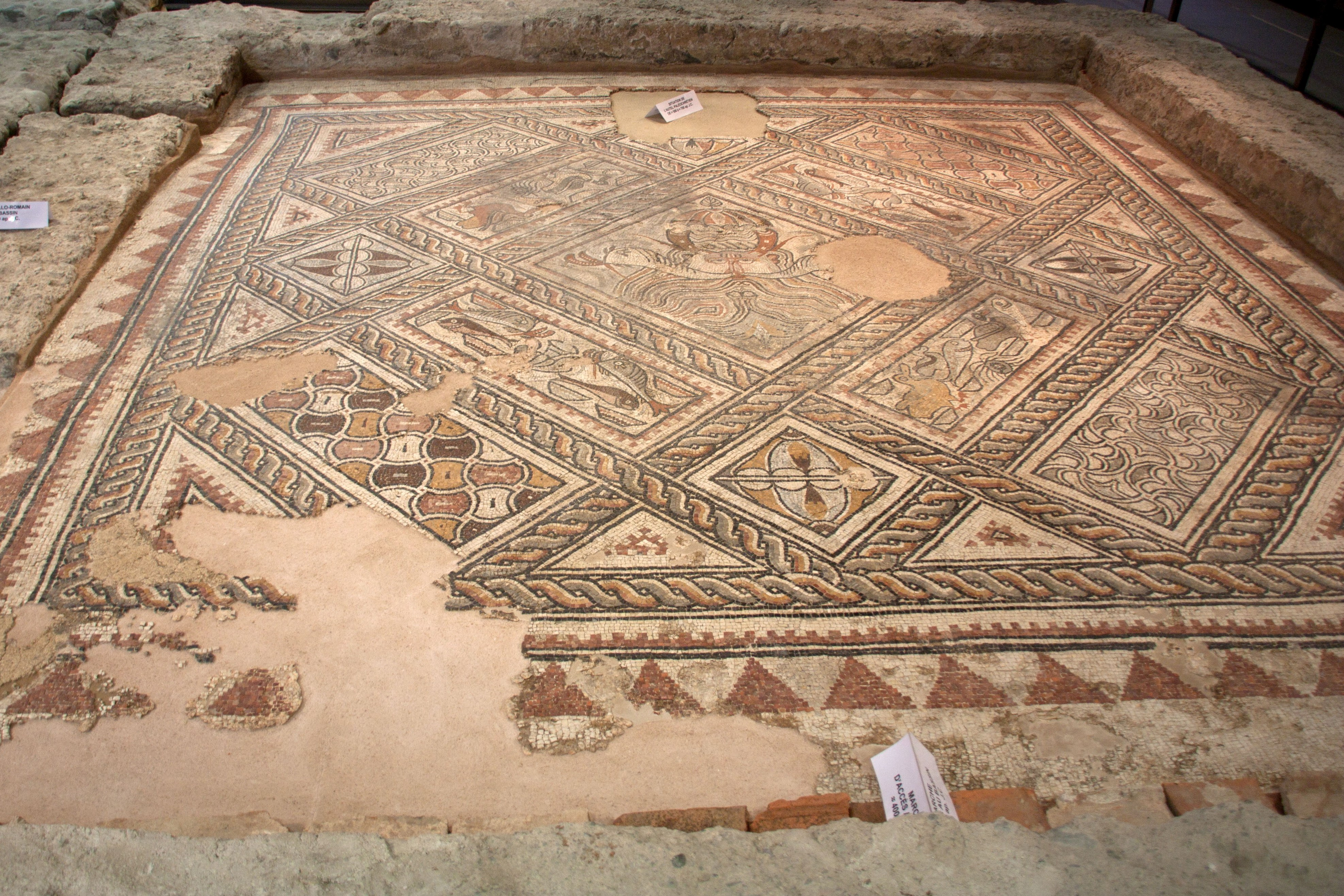 Mosaïque du Dieu Océan du domaine de Saint-Girons, Espace-Muséographique de Maubourguet, Maubourguet, Hautes-Pyrénées, France